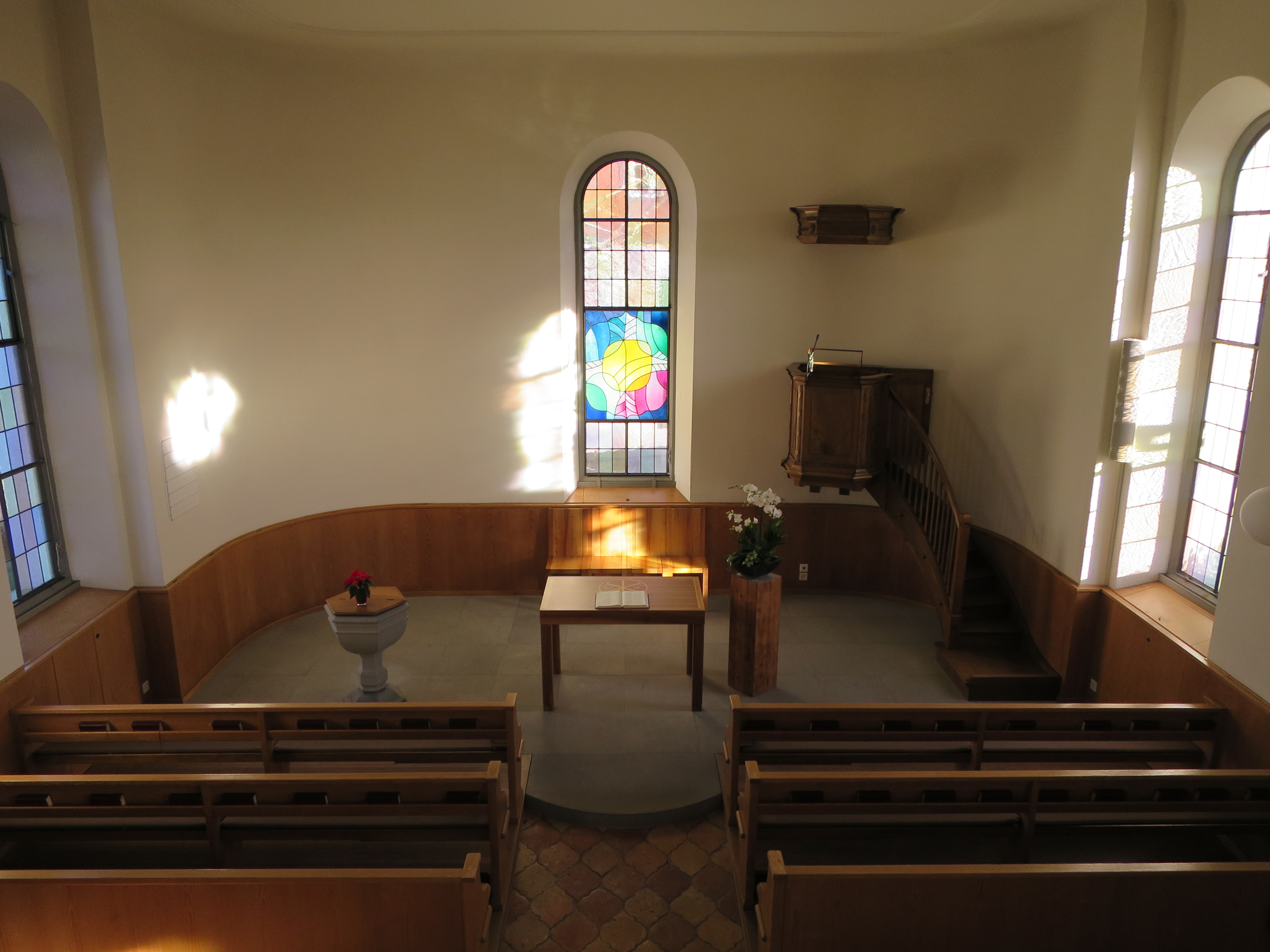 1812-1813 von Hans Conrad Bluntschi erbaut